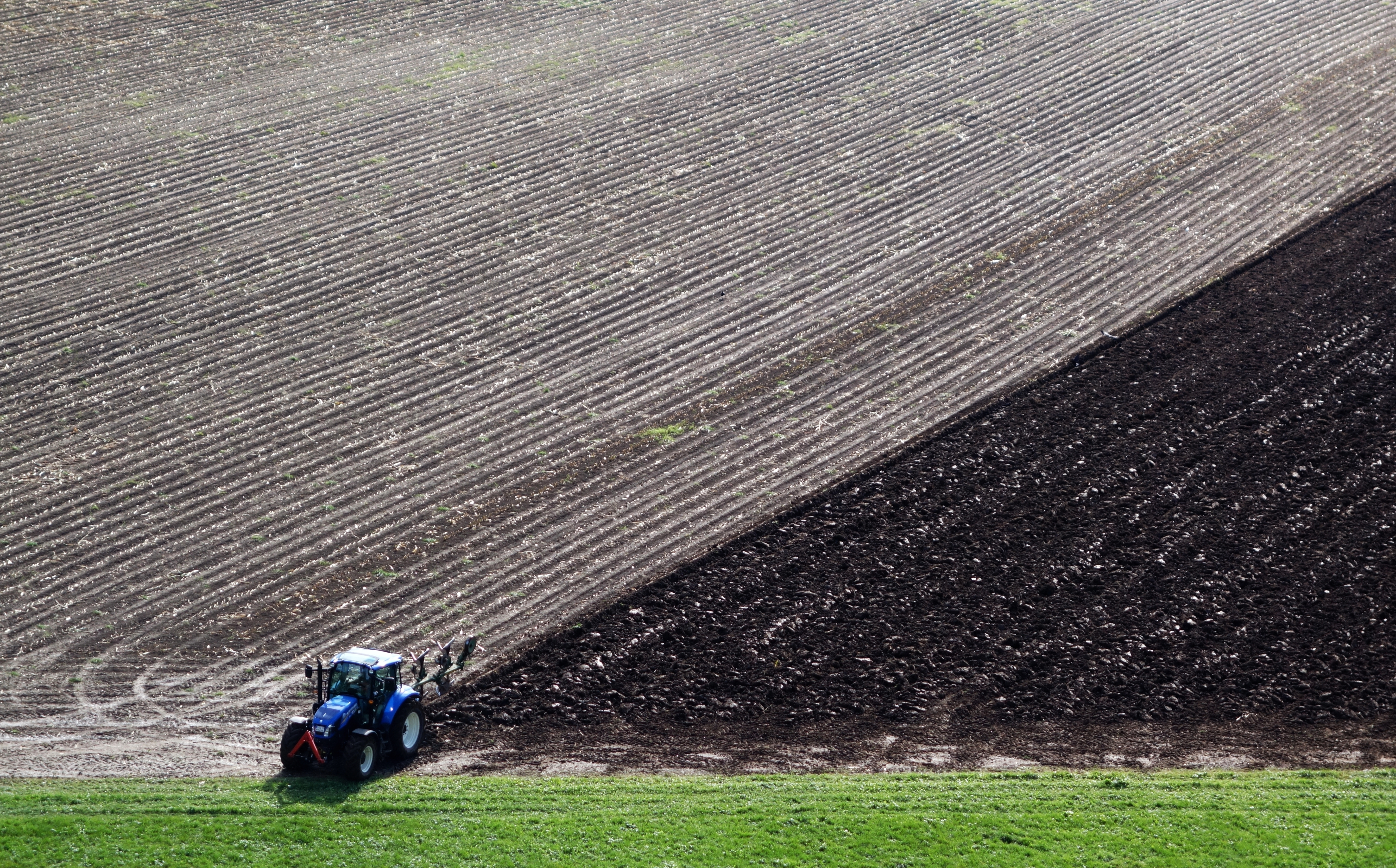 Acker unterhalb der Siechenhalde nördlich Schongau